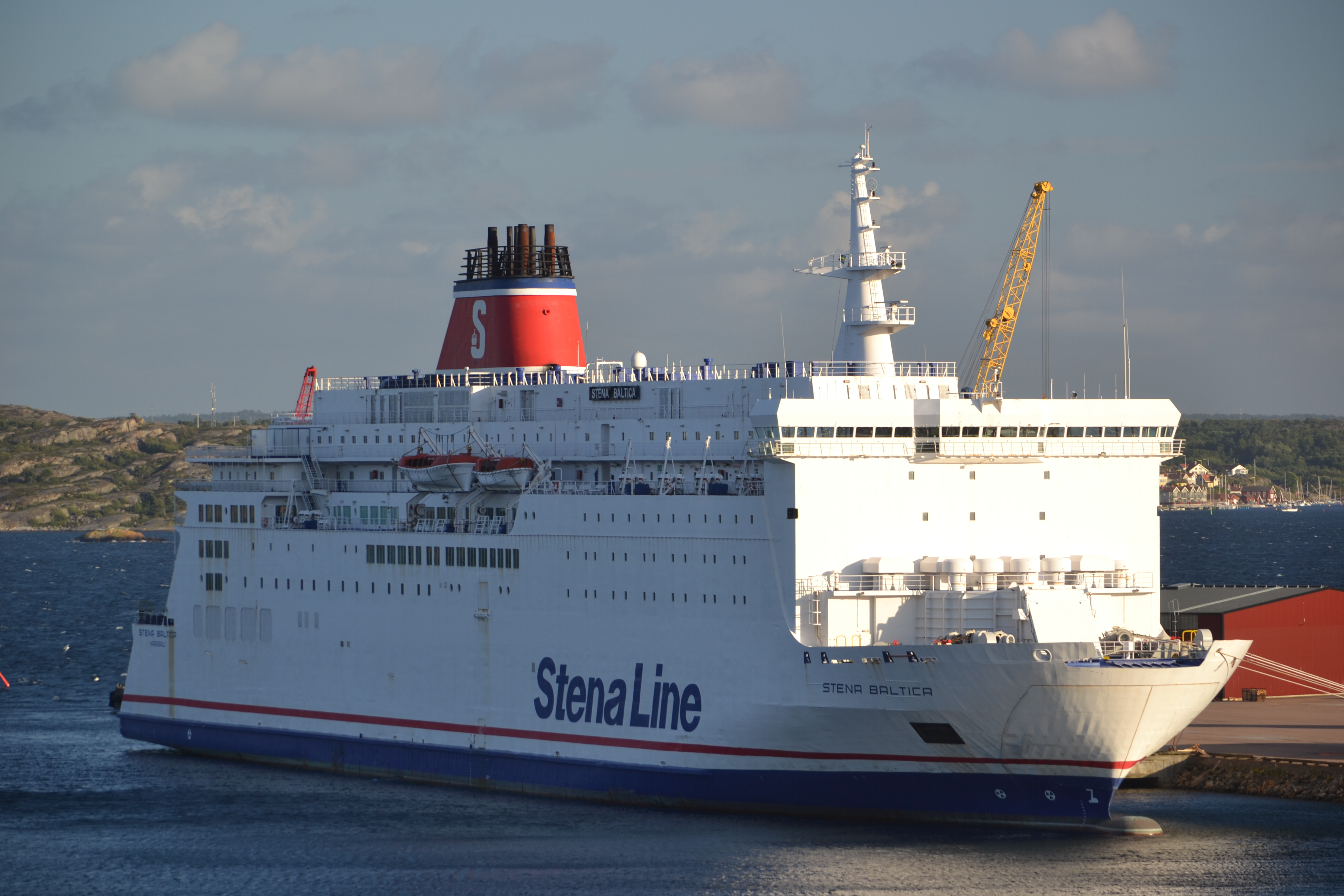 Stena Baltica Ligger i lysekil